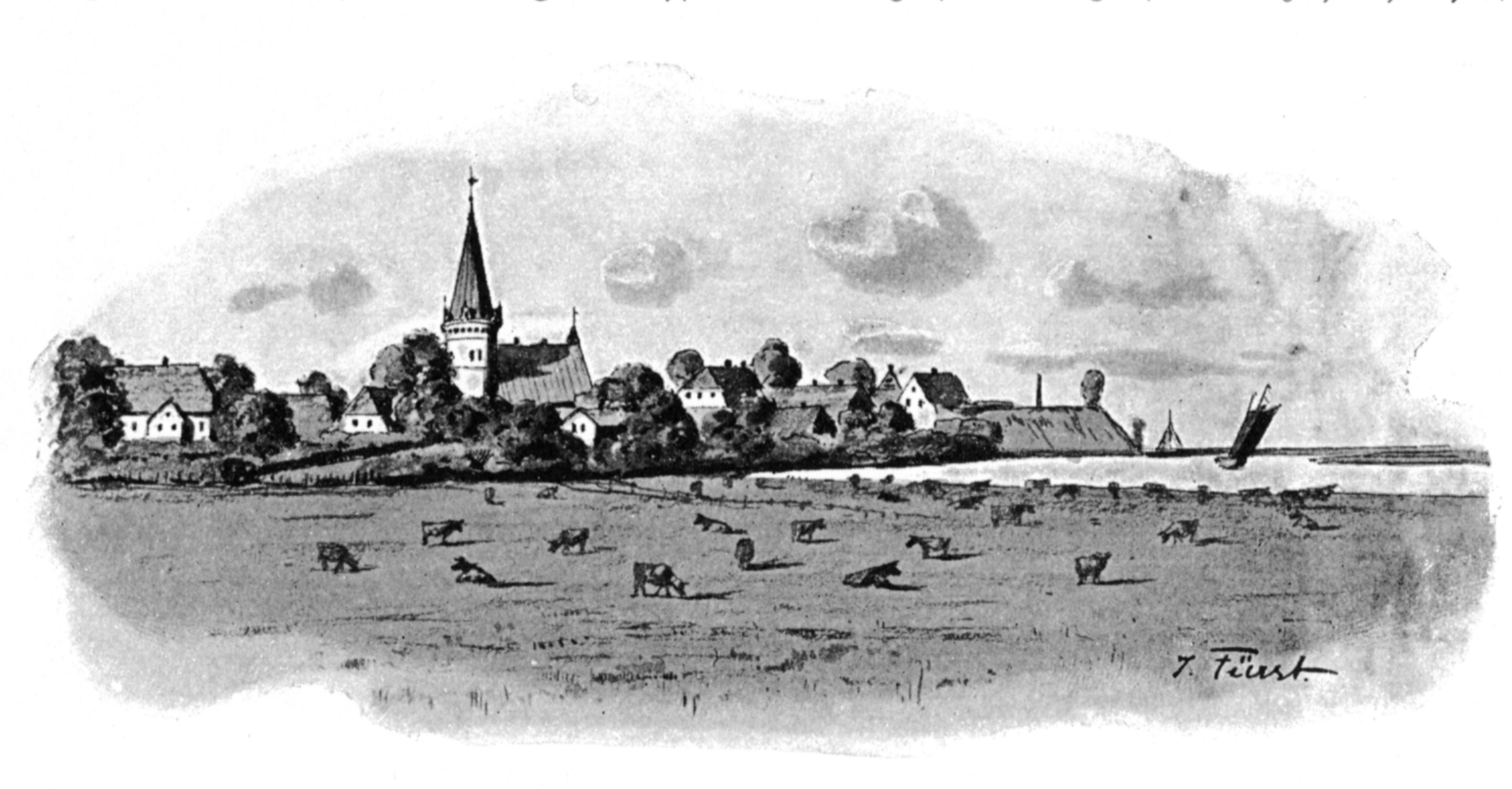 Suderstapel um 1895, Zeichnung von Julius Fürst